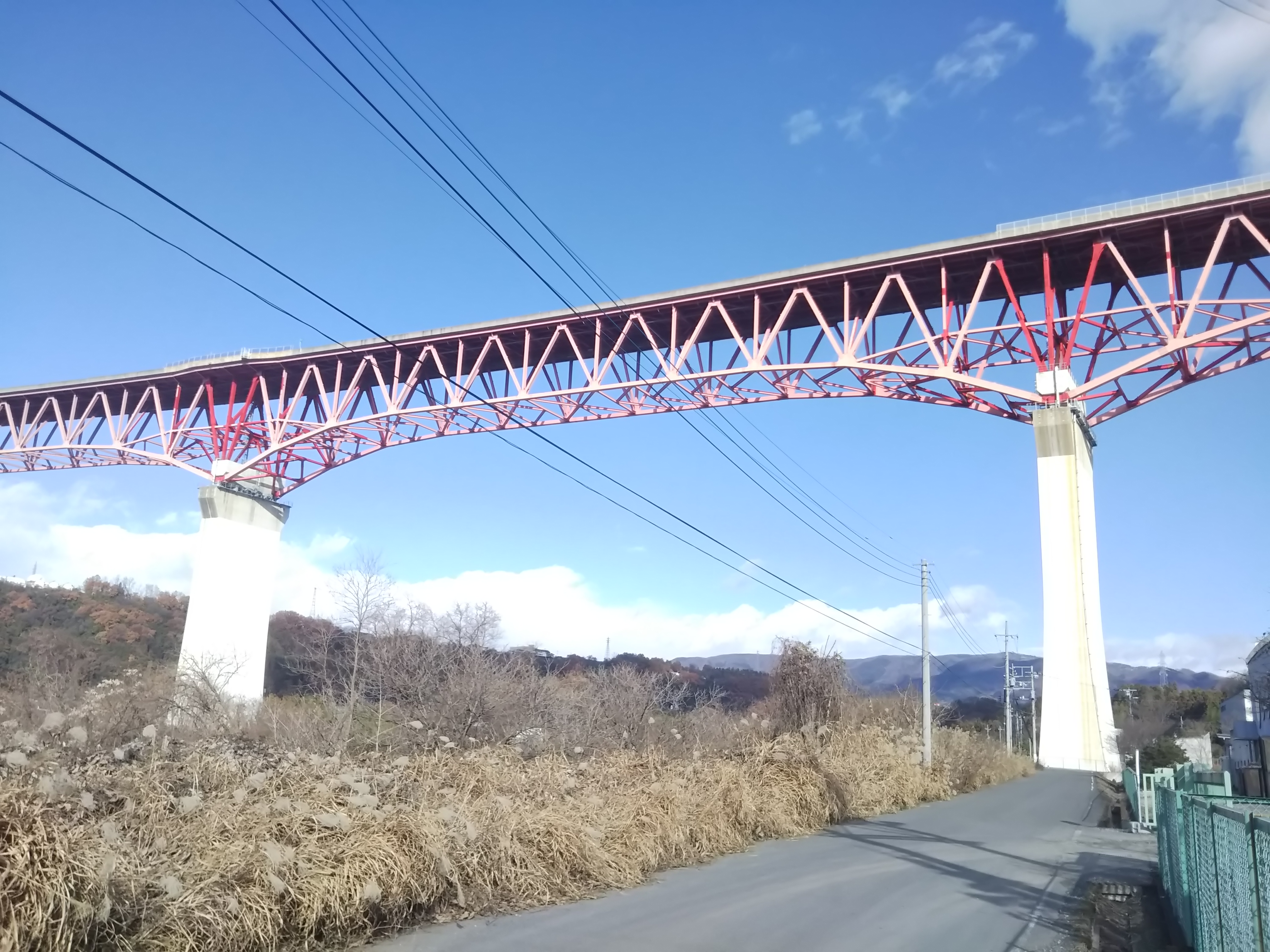 群馬県沼田市と昭和村の間の片品川に架かる、関越自動車道片品川橋